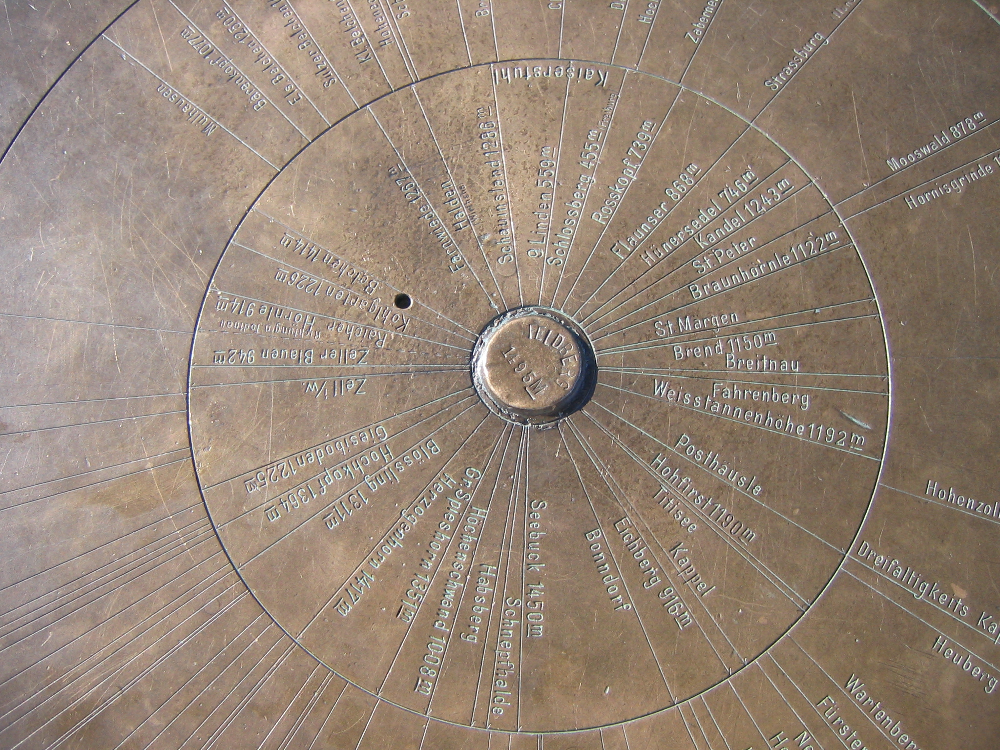 Diese Scheibe findet sich auf dem Gipfel des Feldbergs im Schwarzwald. Sie zeigt, welche Berge und Orte sich in der Umgebung befinden, die man (je nach Wetterlage) sehen kann.